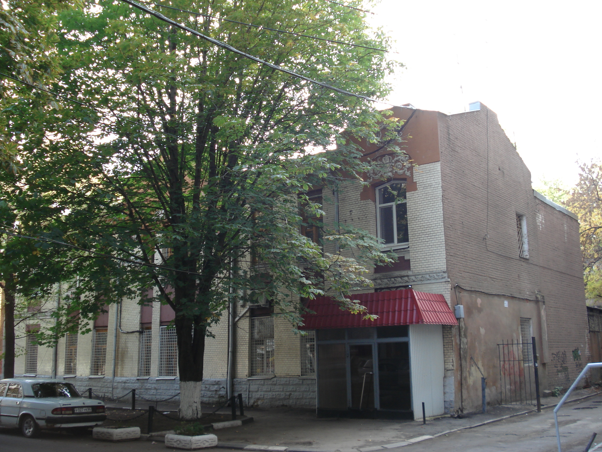 В настоящее время в здании располагается военный комиссариат.